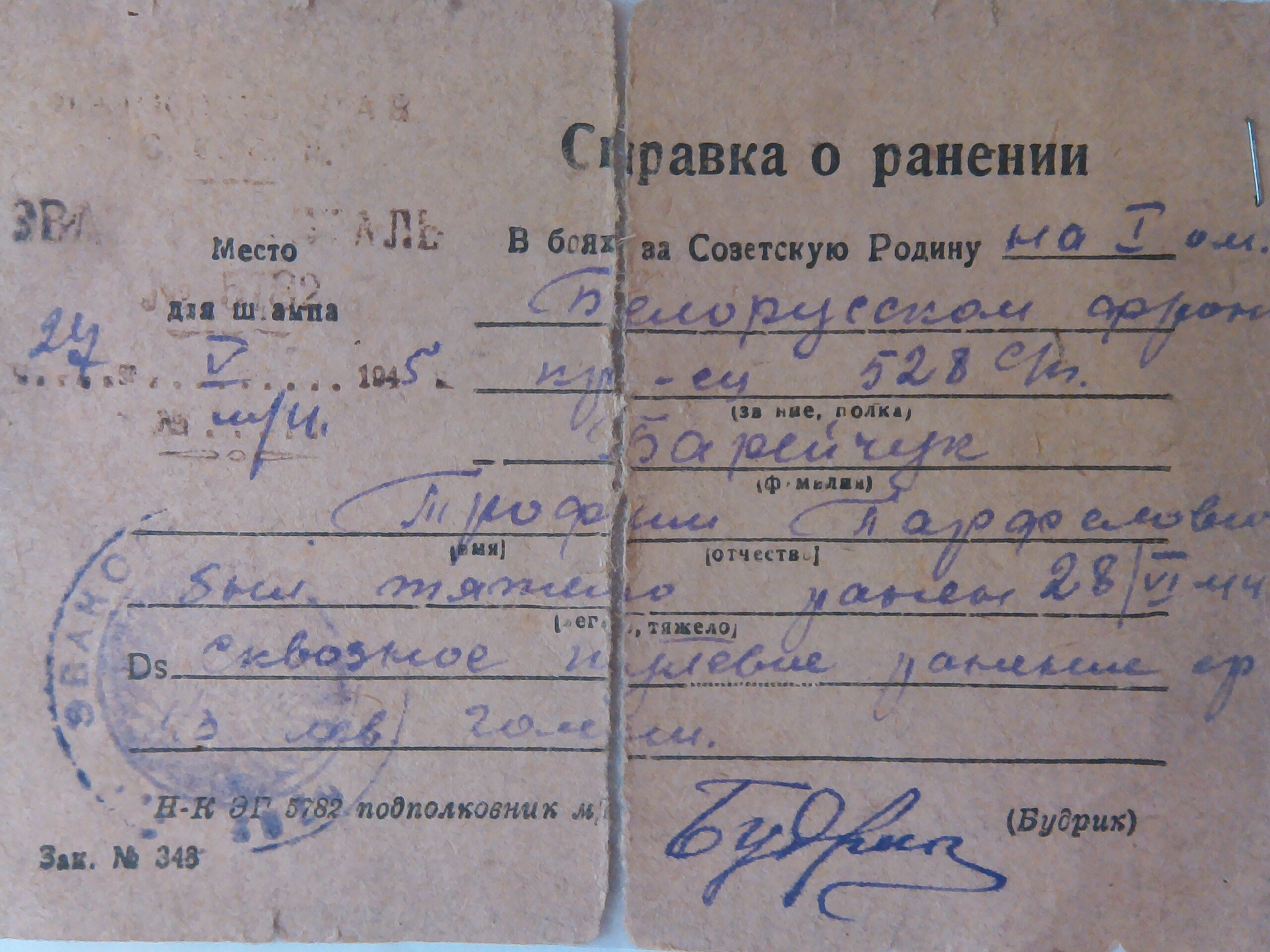 Справка про поранення